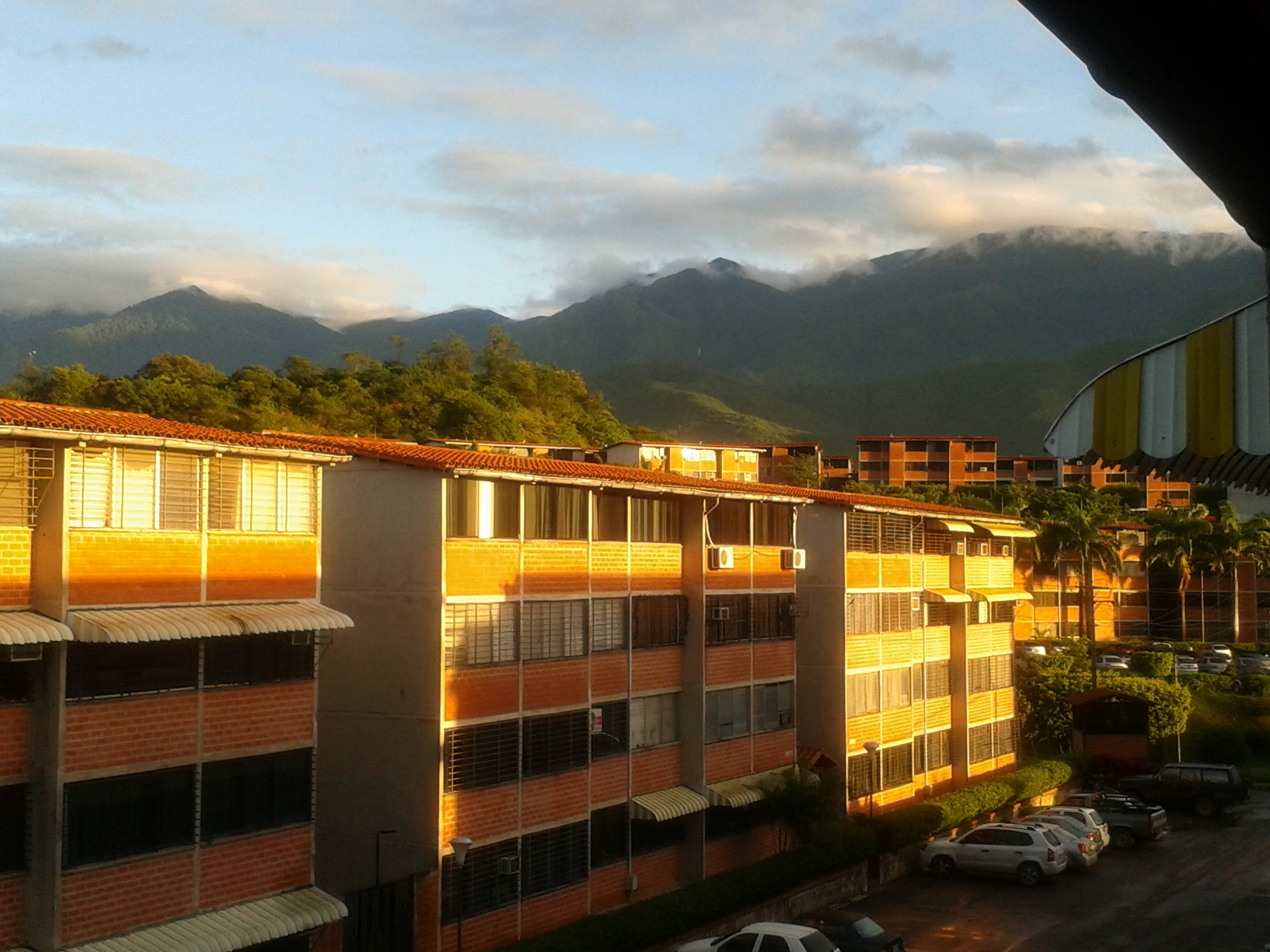 Amanecer en Terrazas del Este Guarenas